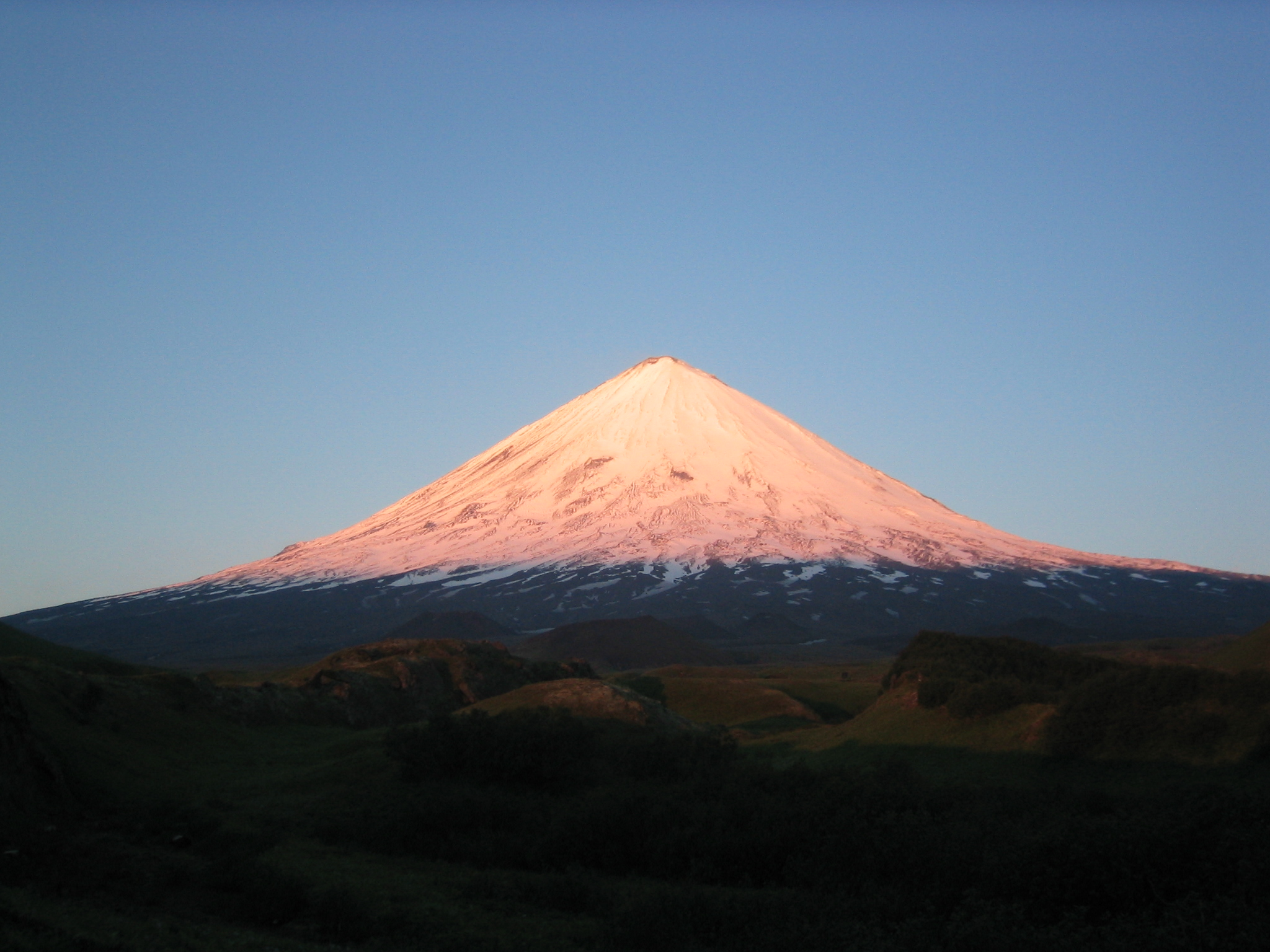 vlastní fotografie